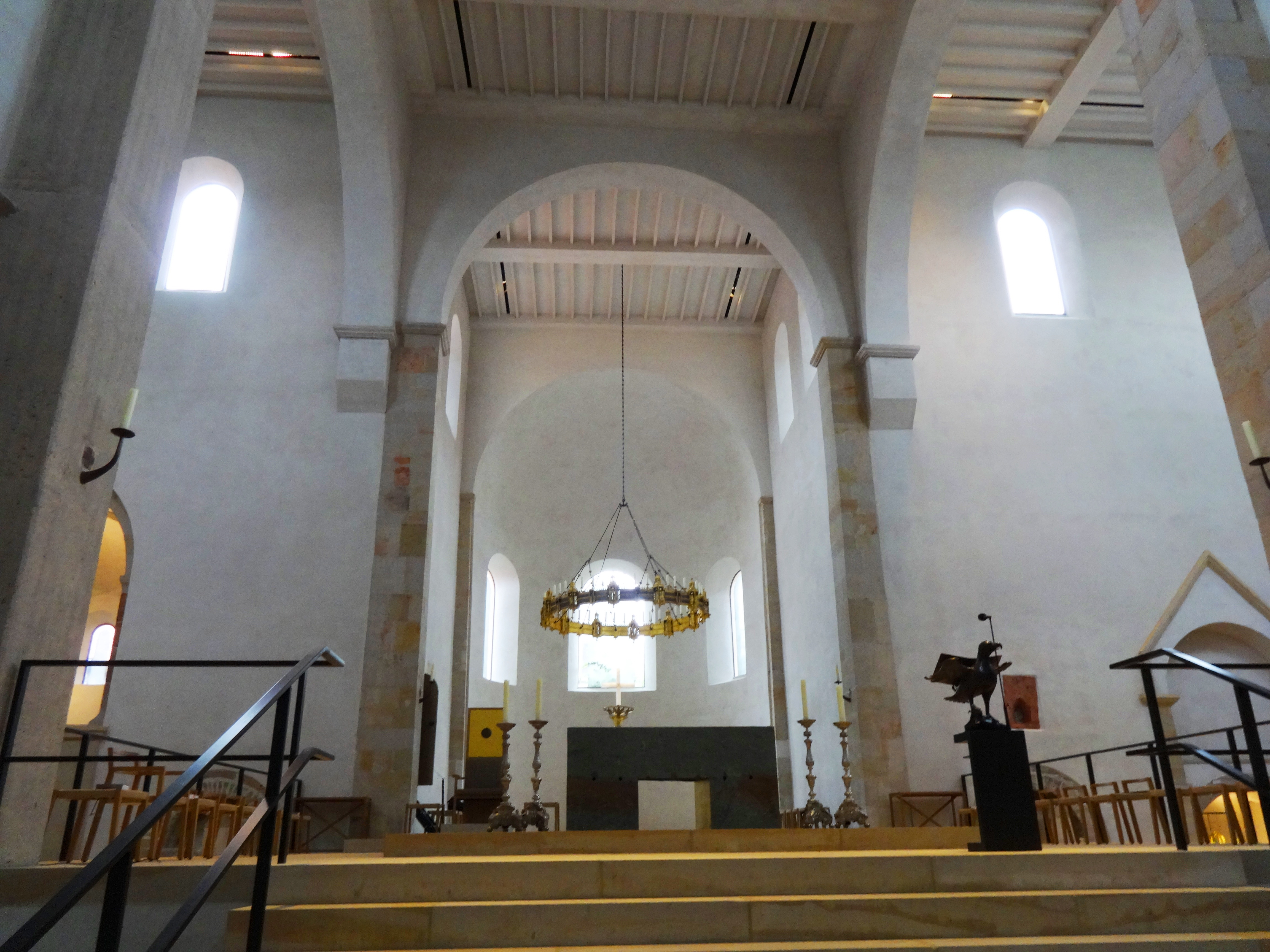 Hildesheimer Dom, Blick zum Altar mit dem Thietmarleuchter